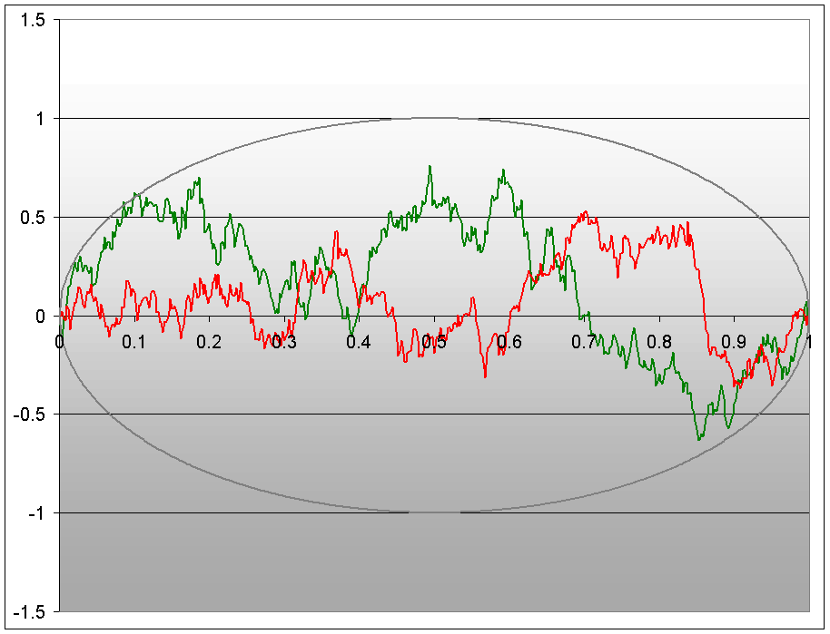 Brownsche Brücken